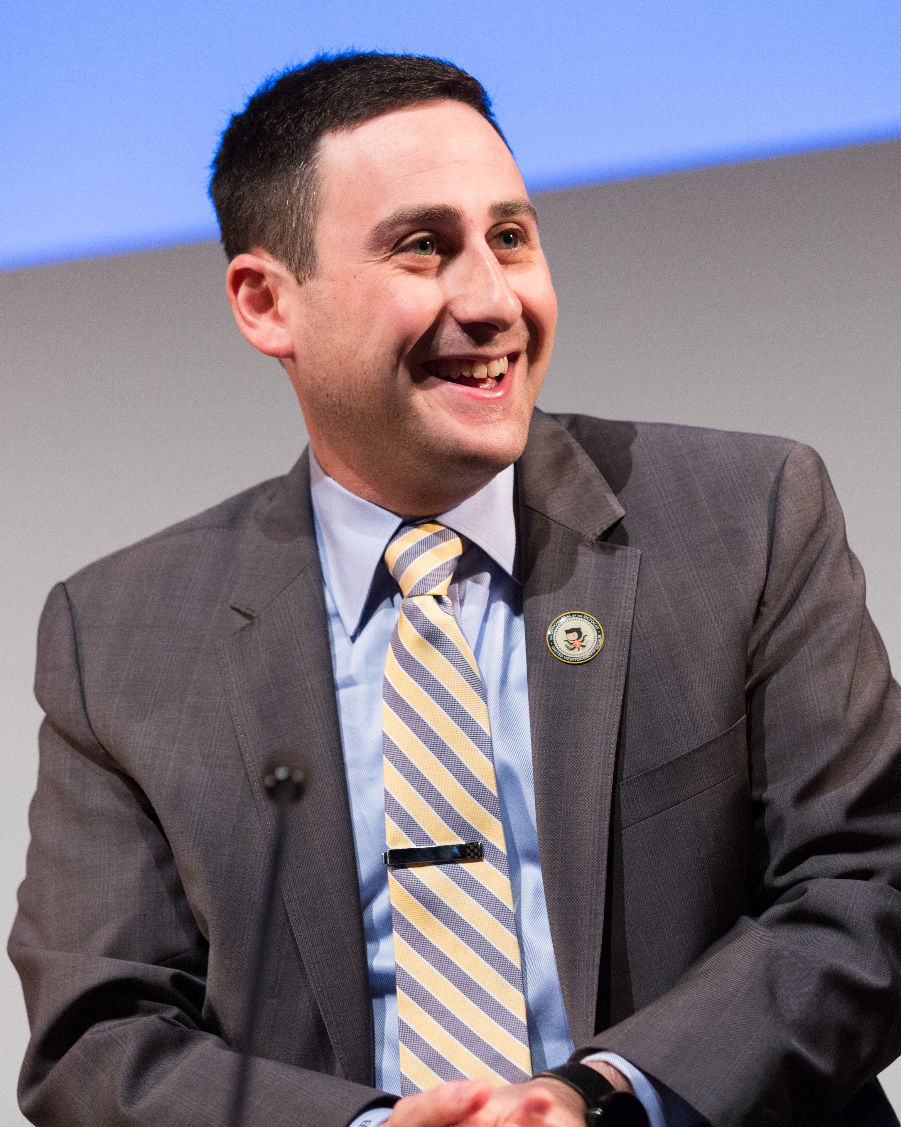 ODISummit_4Nov_158